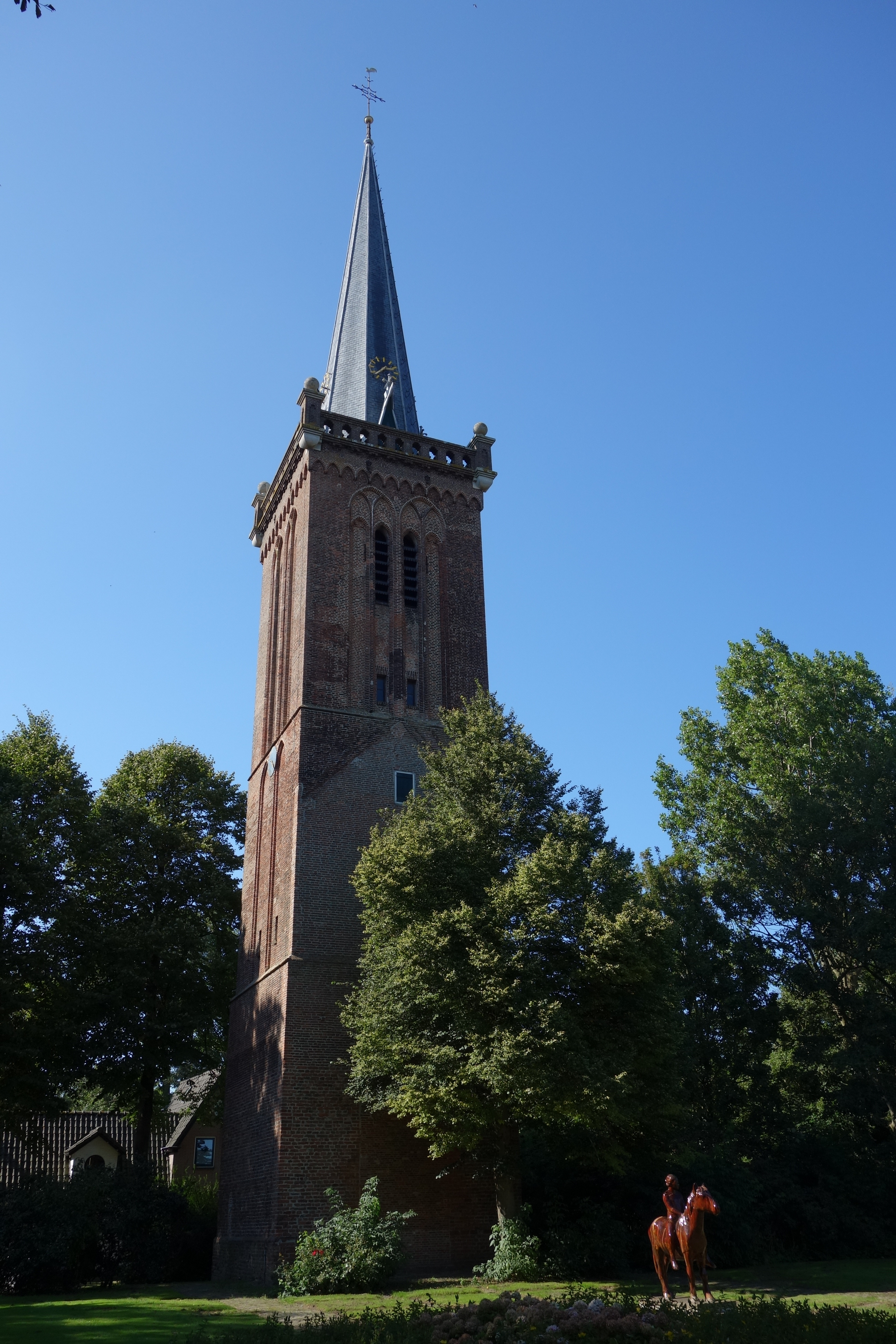 Toren van de voormalige hervormde kerk in het Noord-Hollandse Hem.